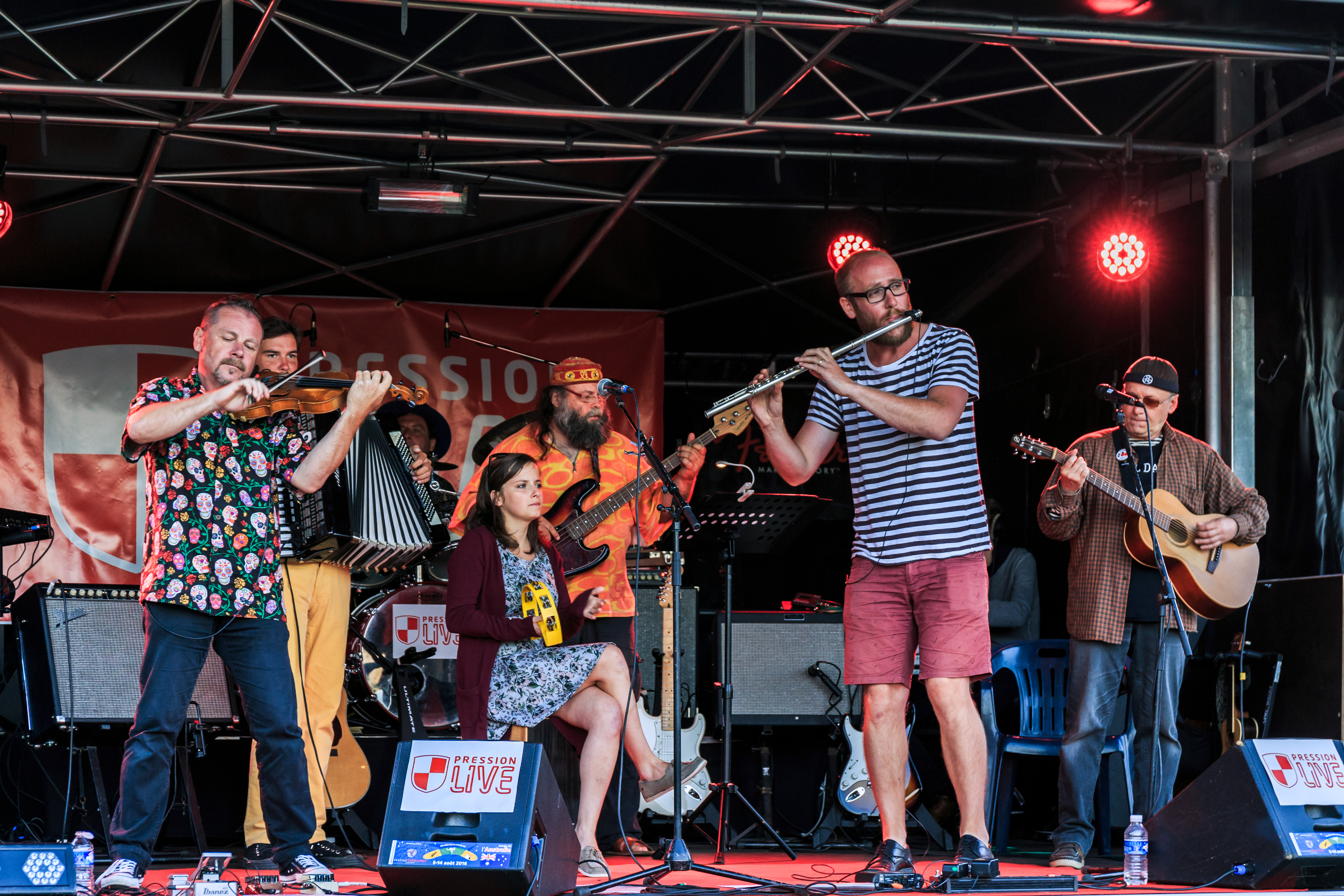 Concert de Jull Dajen sur la scène ouverte Pression Live située au Breizh Stade lors du festival Interceltique de Lorient le 6 août 2016.